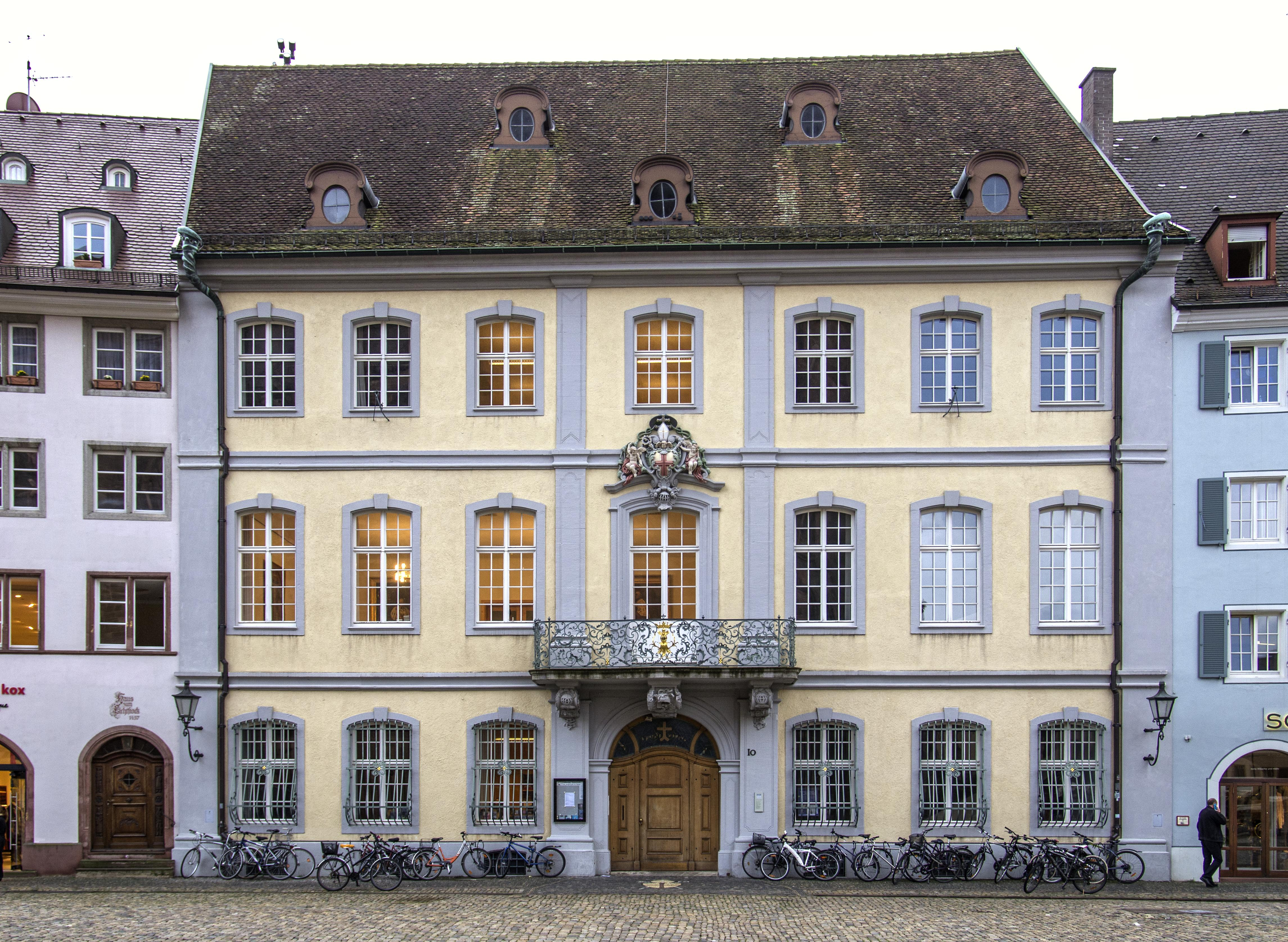 Erzbischöfliches Palais auf dem Freiburger Münsterplatz DFN Treffen am 12.09.2013 auf dem Freiburger Münsterplatz